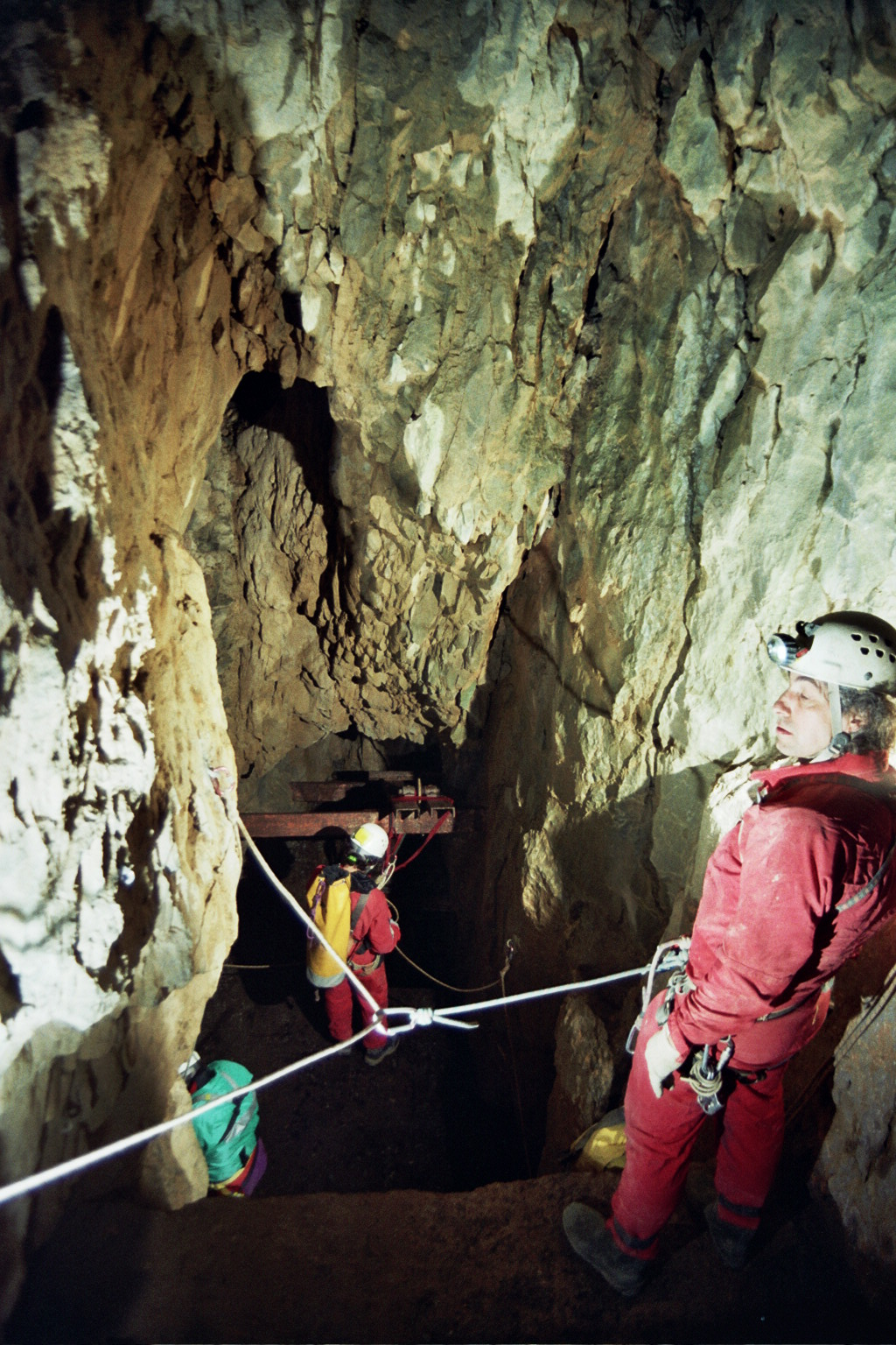 Espeleólogos de la UEV en la entrada de la Sima de San Martín / Pozo Lépineux el año 2010.